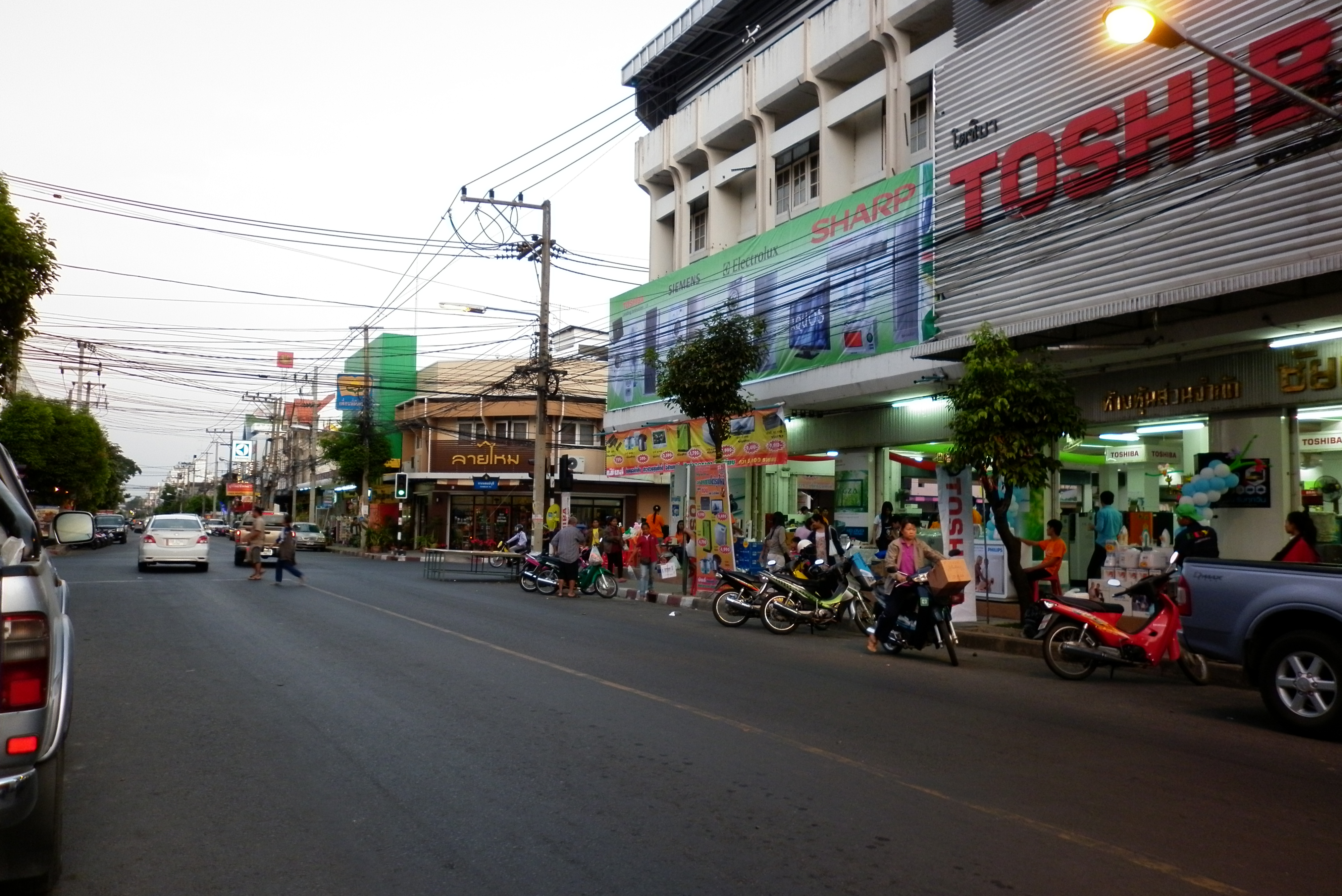 Buriram